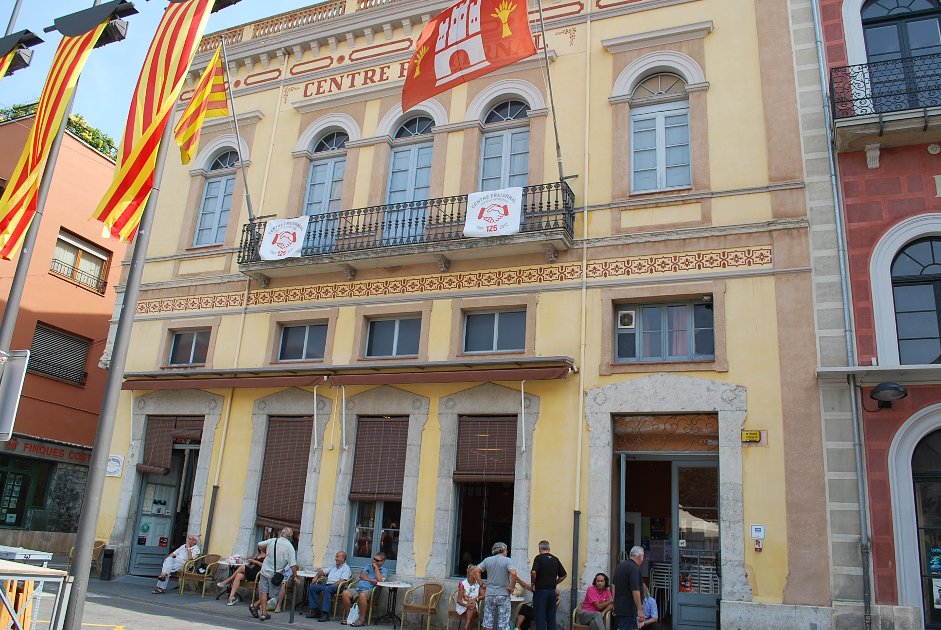 Centre Fraternal (Palafrugell)